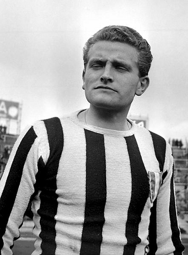 Il calciatore italiano Giampiero Boniperti alla Juventus nella stagione 1950-51.